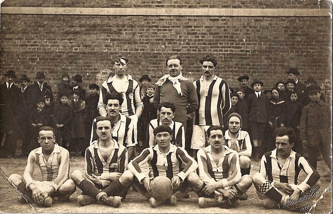 Stade amiénois en 1922. Debout : Sprécher, Rupert, Bourdrel ; à genou : Wiart, Braun, Deparis ; assis : ?, ?, Pruvost, Troudes, ?